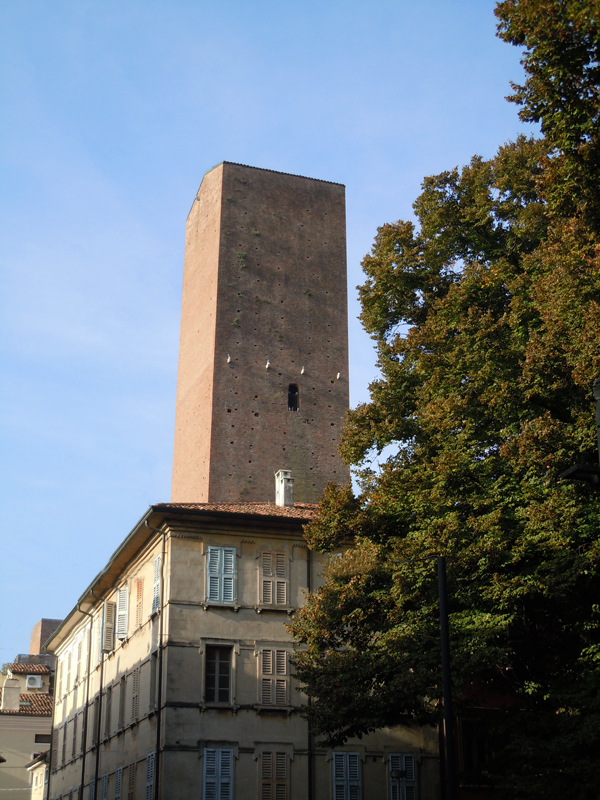 Mantova, Torre degli Zuccaro vista da Via Rubens.